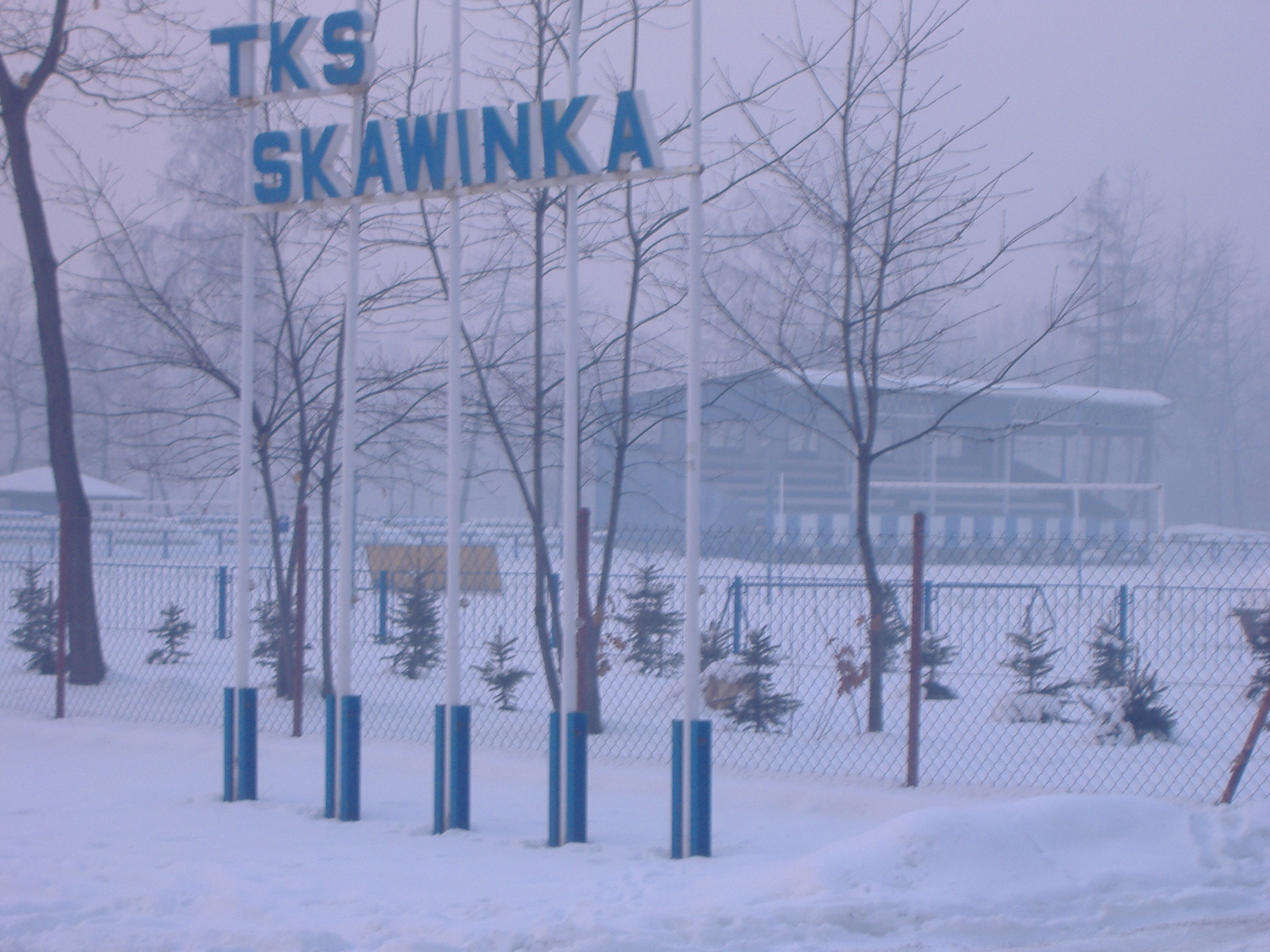 Stadion TKS Skawina